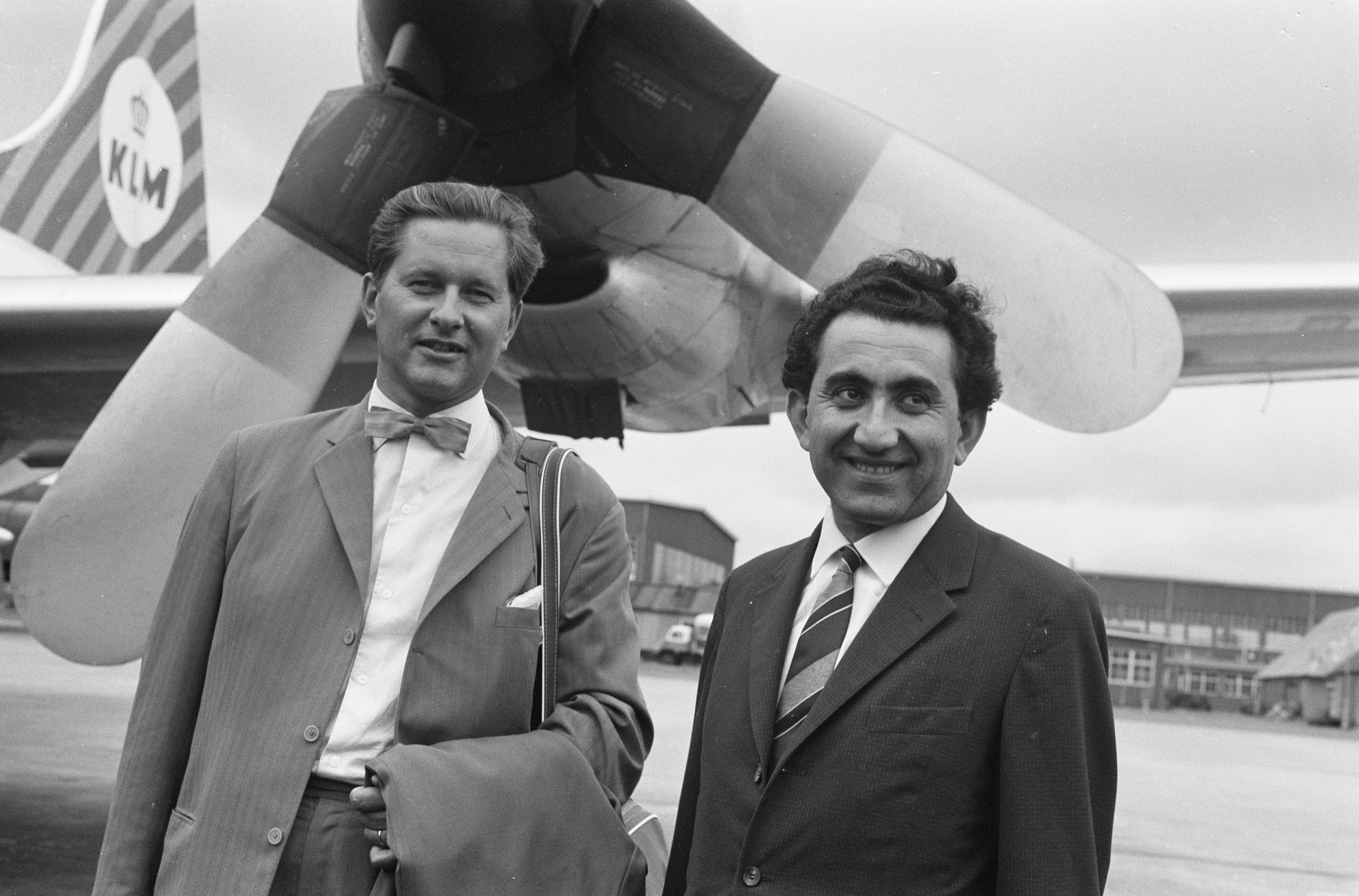 Collectie / Archief : Fotocollectie Anefo Reportage / Serie : [ onbekend ] Beschrijving : Russiche schakers voor een week in Nederland, winnaar van het kandidatentoernooi Petrosian en Keres tweede Datum : 1 juli 1962 Locatie : Nederland, Rusland Trefwoorden : Winnaars, schaken, toernooien Fotograaf : Pot, Harry / Anefo Auteursrechthebbende : Nationaal Archief Materiaalsoort : Negatief (zwart/wit) Nummer archiefinventaris : bekijk toegang 2.24.01.05 Bestanddeelnummer : 914-0808